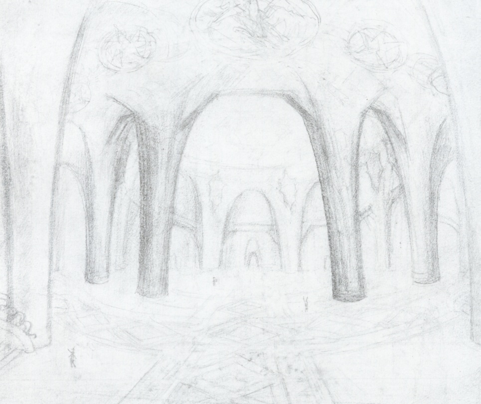 Recibidor del Hotel Atracción.